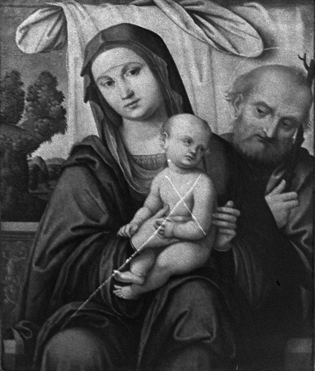 5 schilderijen in Rijksmuseum zijn beschadigd door onbekenden A'dam: schilderij "De heilige Familie van Lorenzo Costa is het meest beschadigd